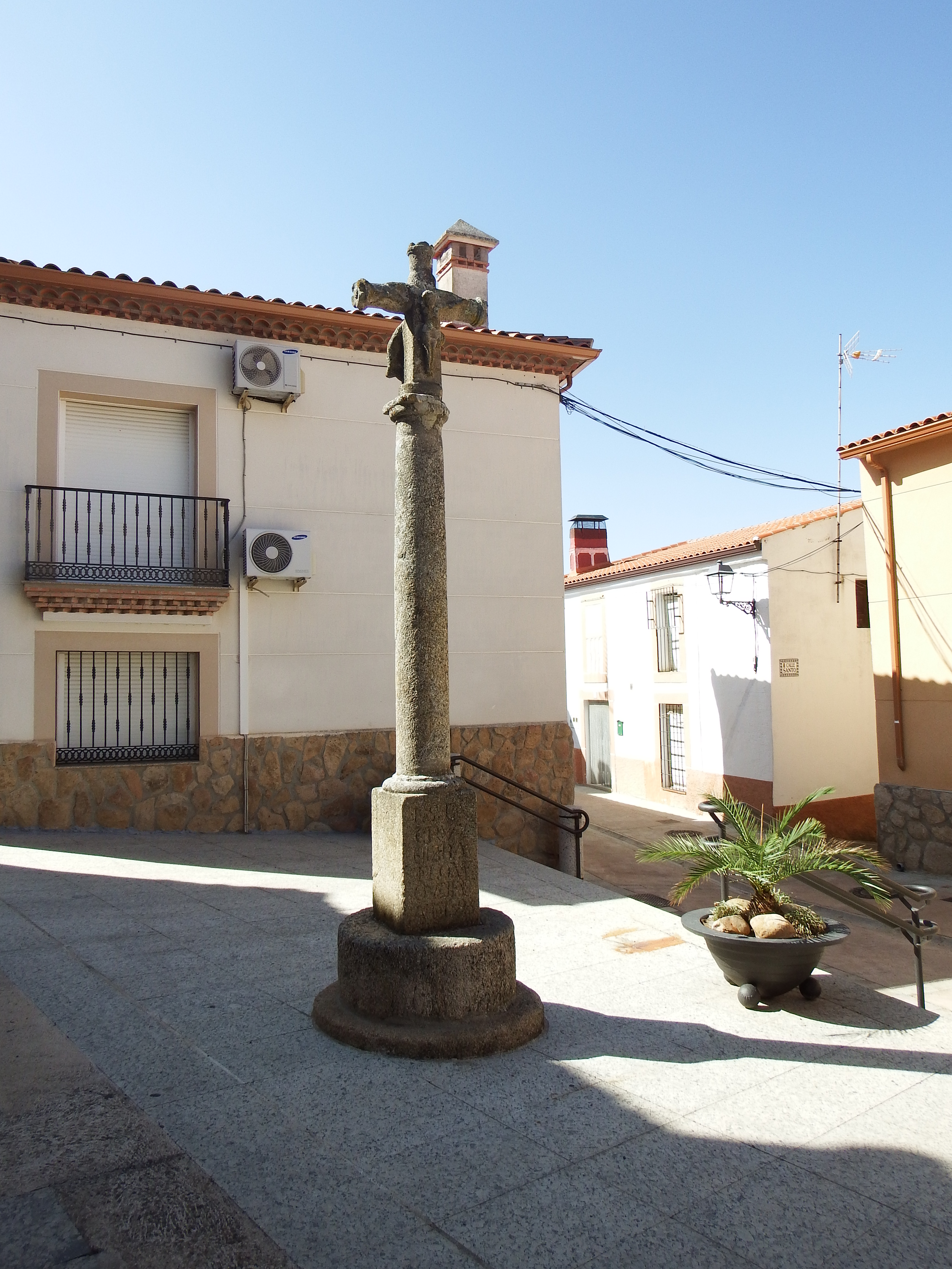 Serrejón